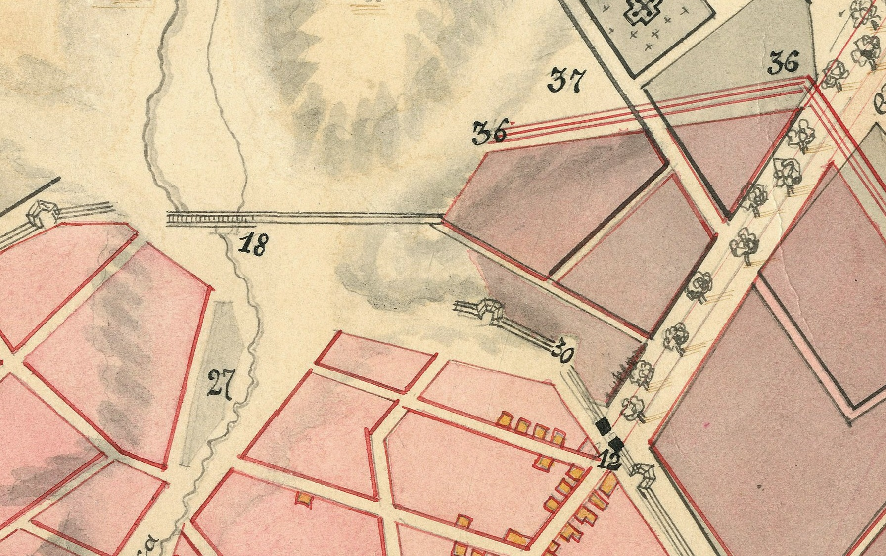 Беларуская (тарашкевіца): Магілёў (Магілёў). Плян места